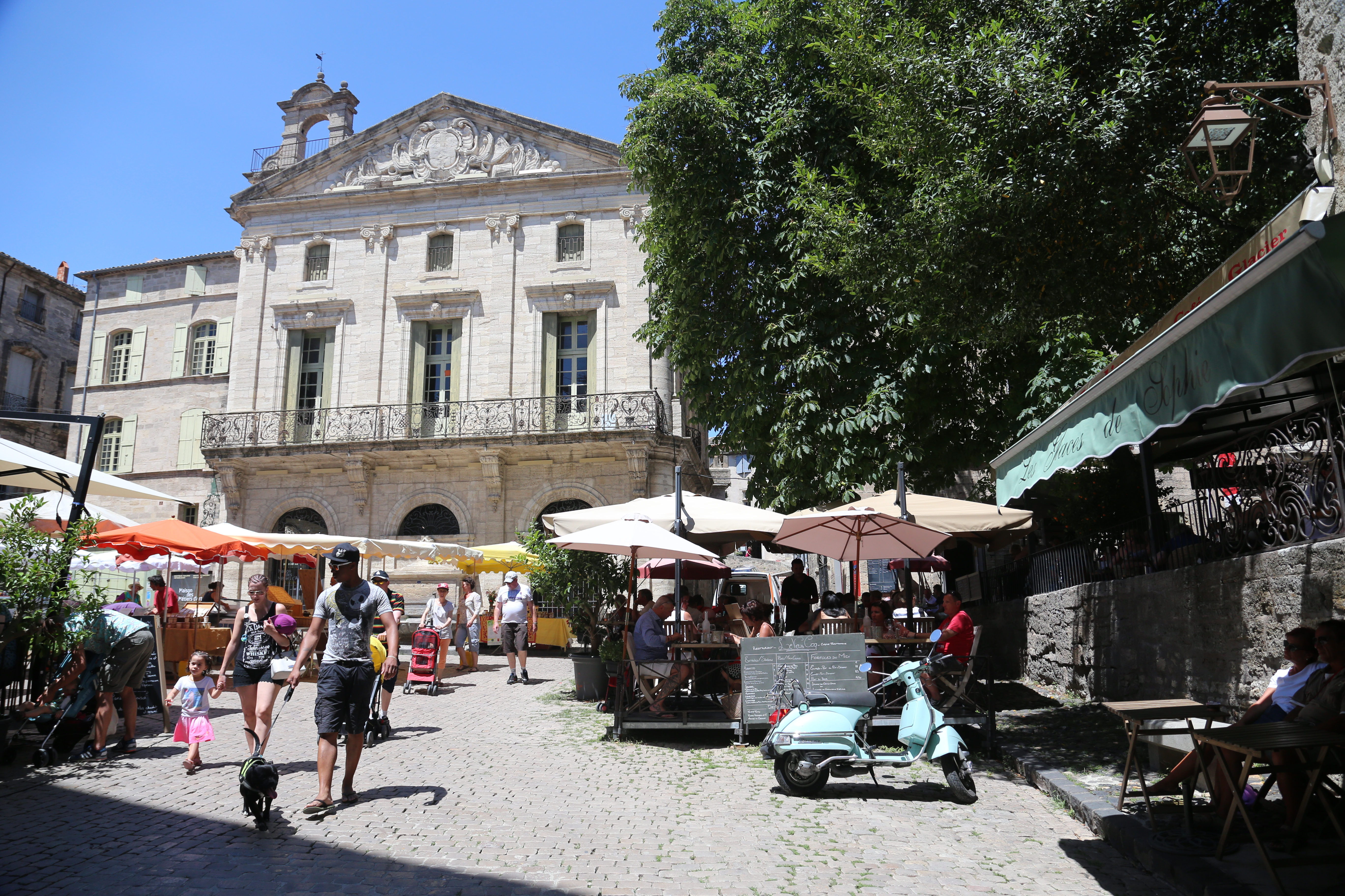 34120 Pézenas, France